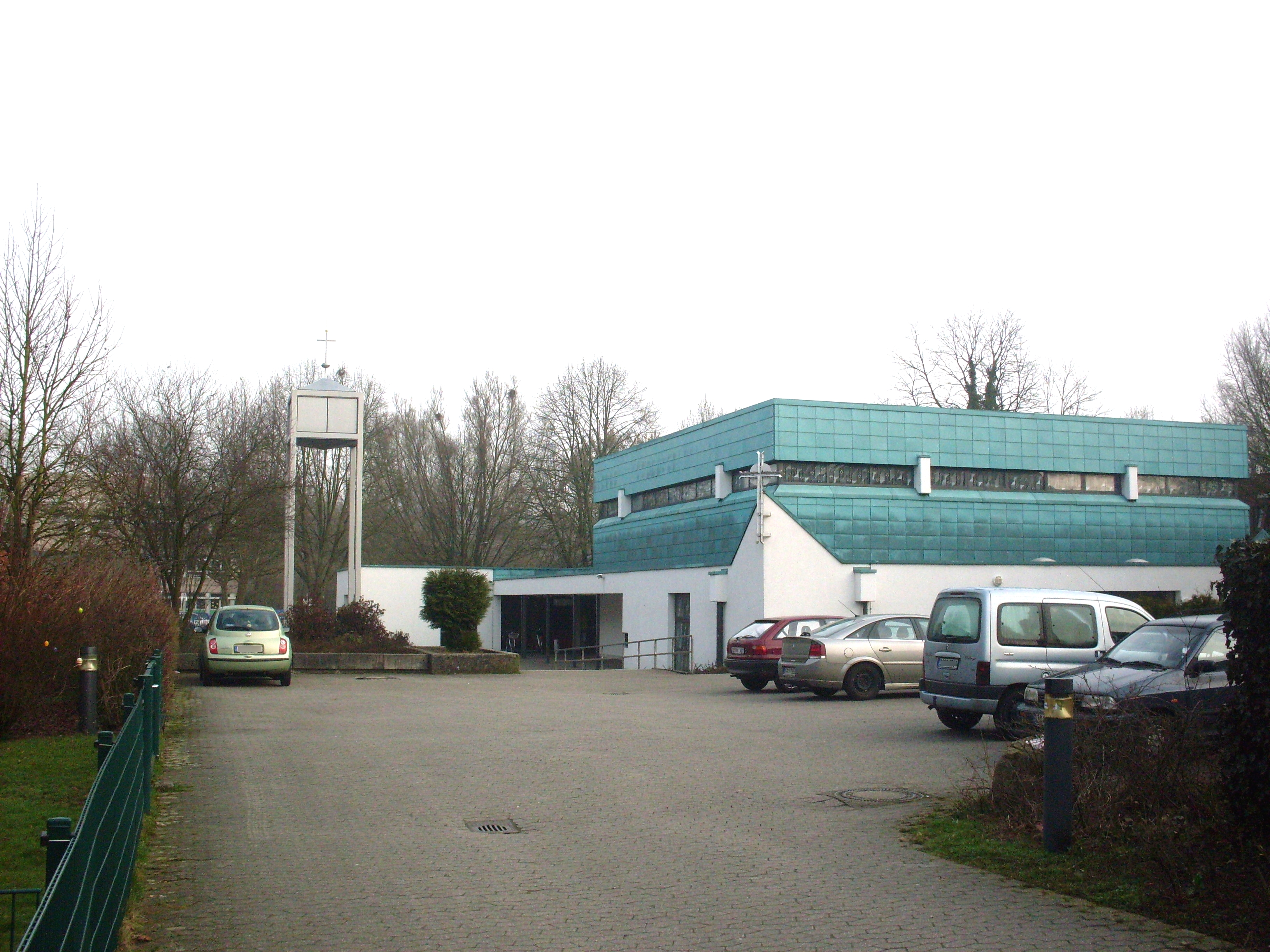 Sankt Maria vom Frieden, Katholische Kirche